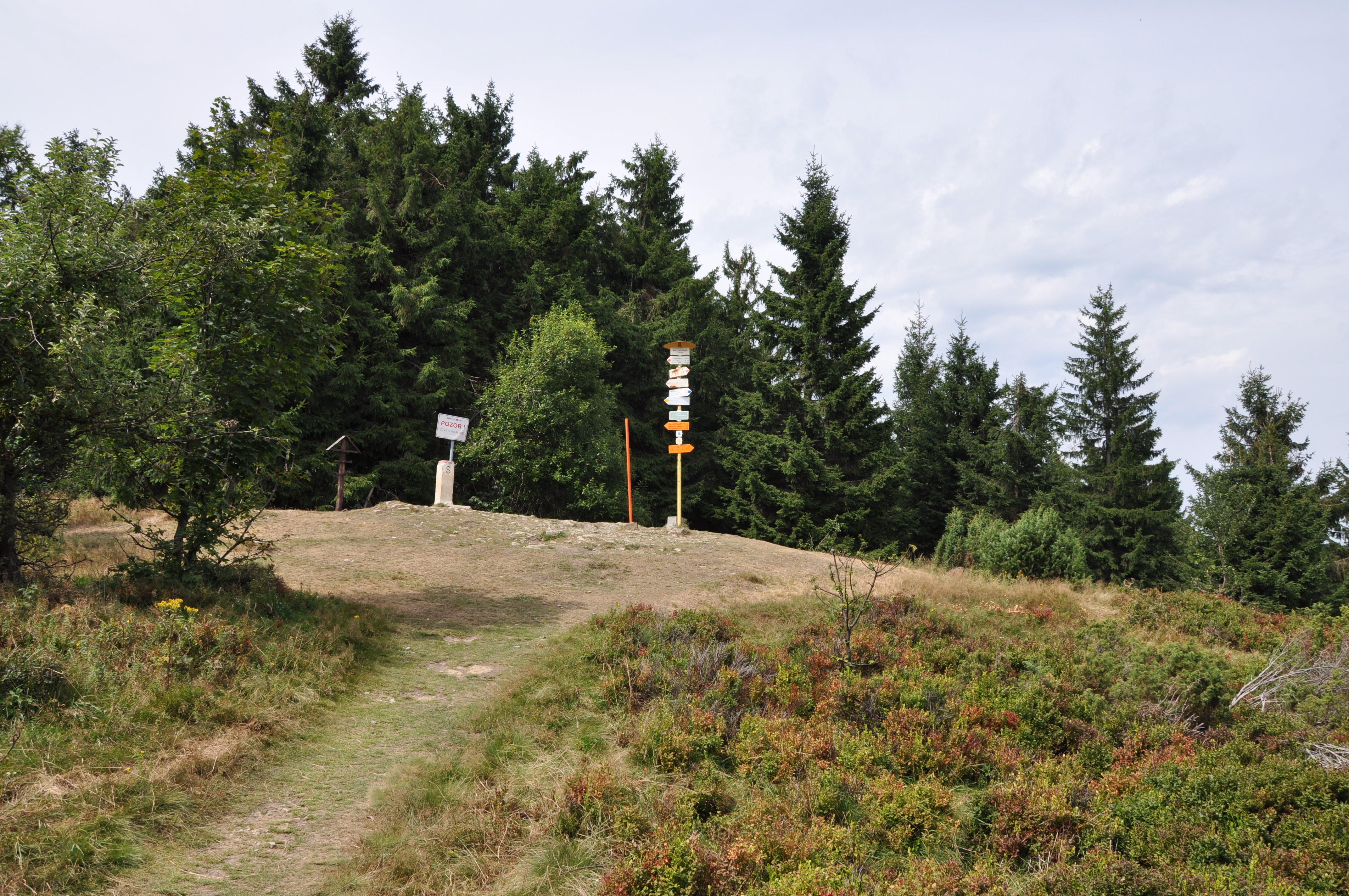 Vrchol Malého Javorníku